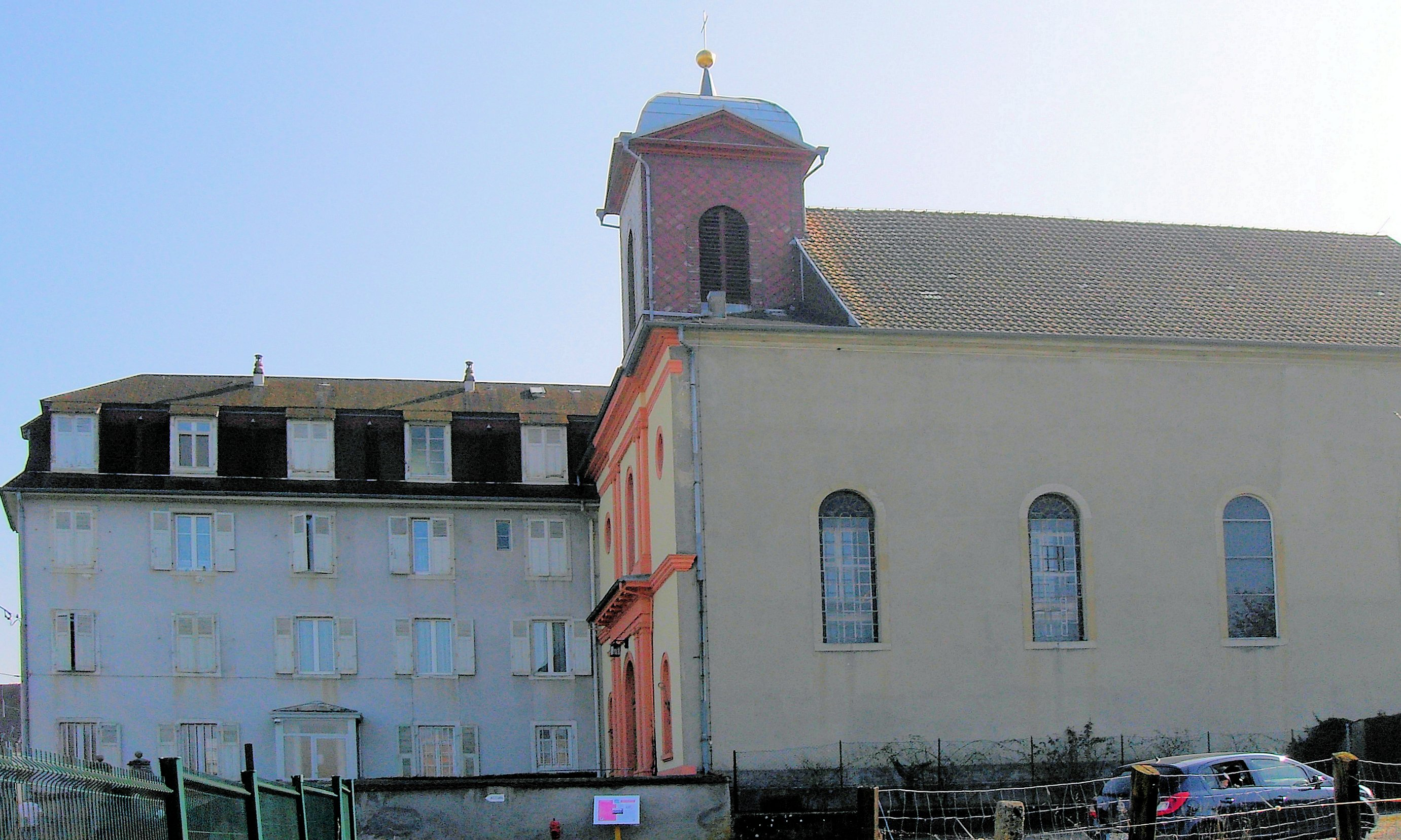 La chapelle du couvent des Rédemptoristes à Landser (ancien couvent des capucins de Saint-Alphonse)